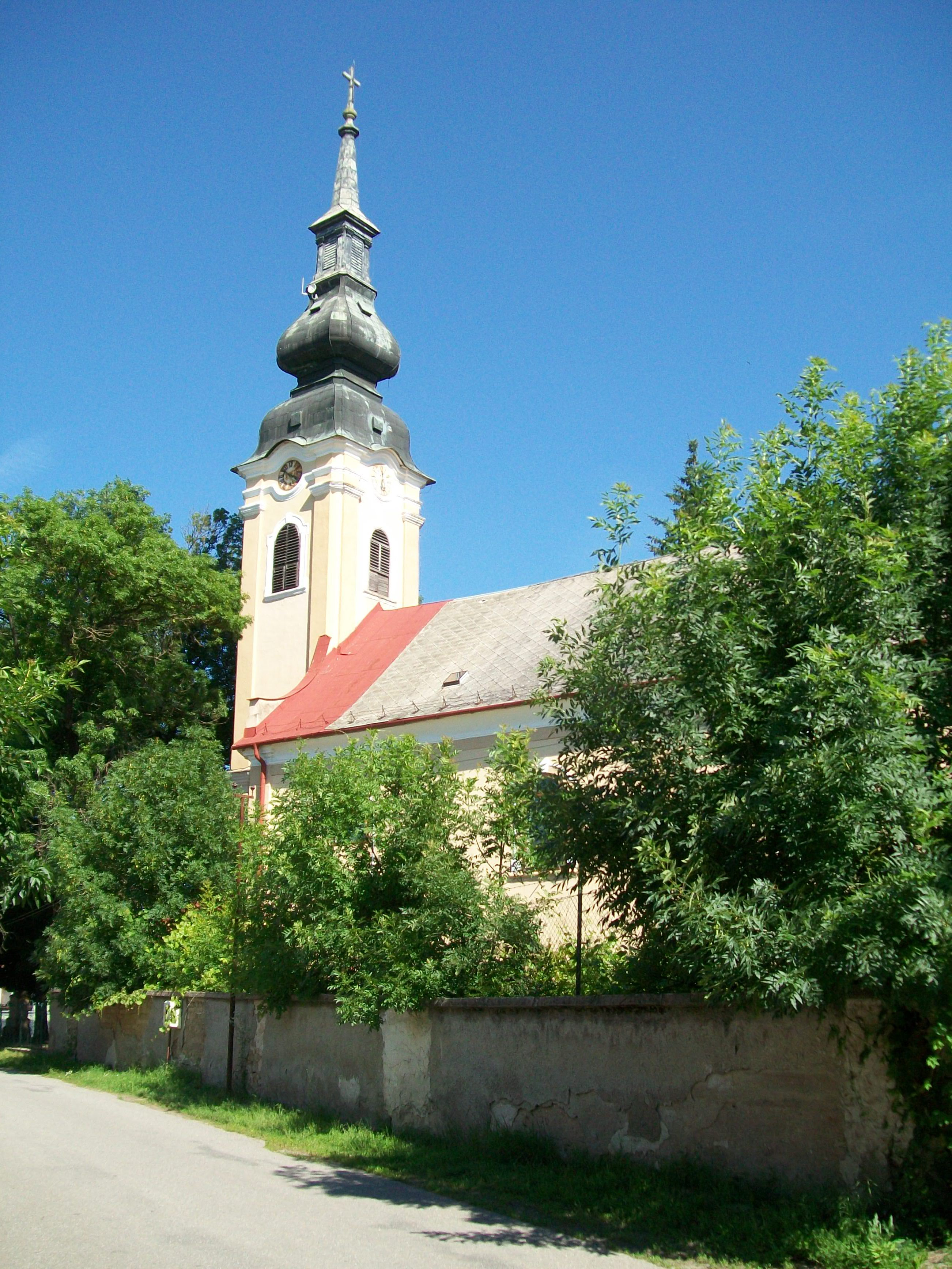 Rímsko-katolícky kostol sv. Dionýza Areopageta v Boľkovciach (okr. Lučenec) - kultúrna pamiatka